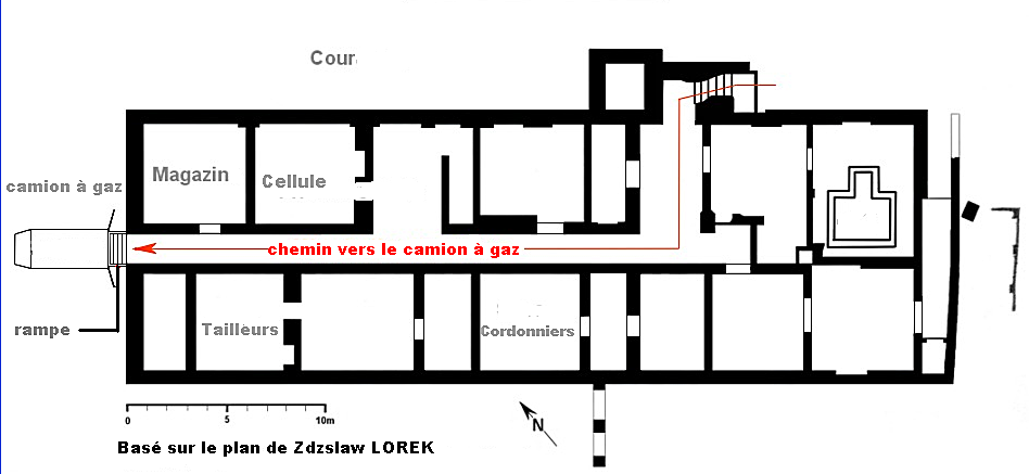 plan du sous-sol du chateau du camp d'extermination de chelmno